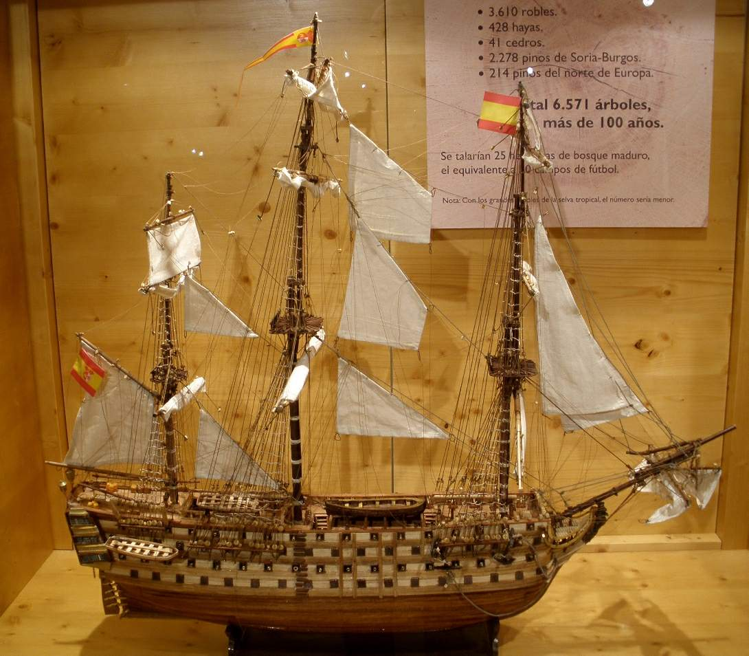 Valladolid - Museo de la Ciencia, modelo del galeón Santísima Trinidad